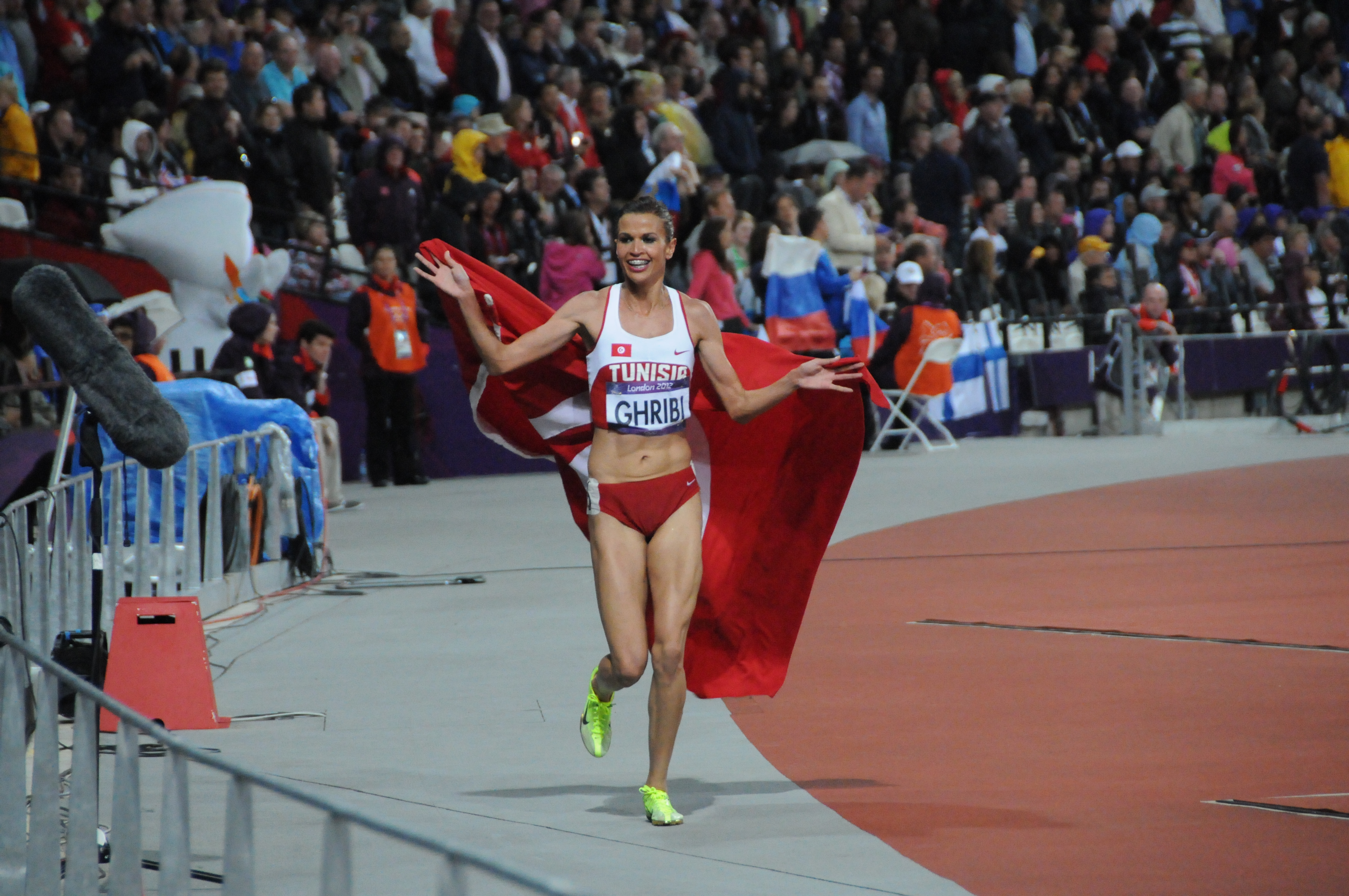 Habiba Ghribi fetant sa médaille d'argent du 3000 m steeple au JO de Londres 2012